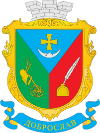 Герб смт. Доброслав